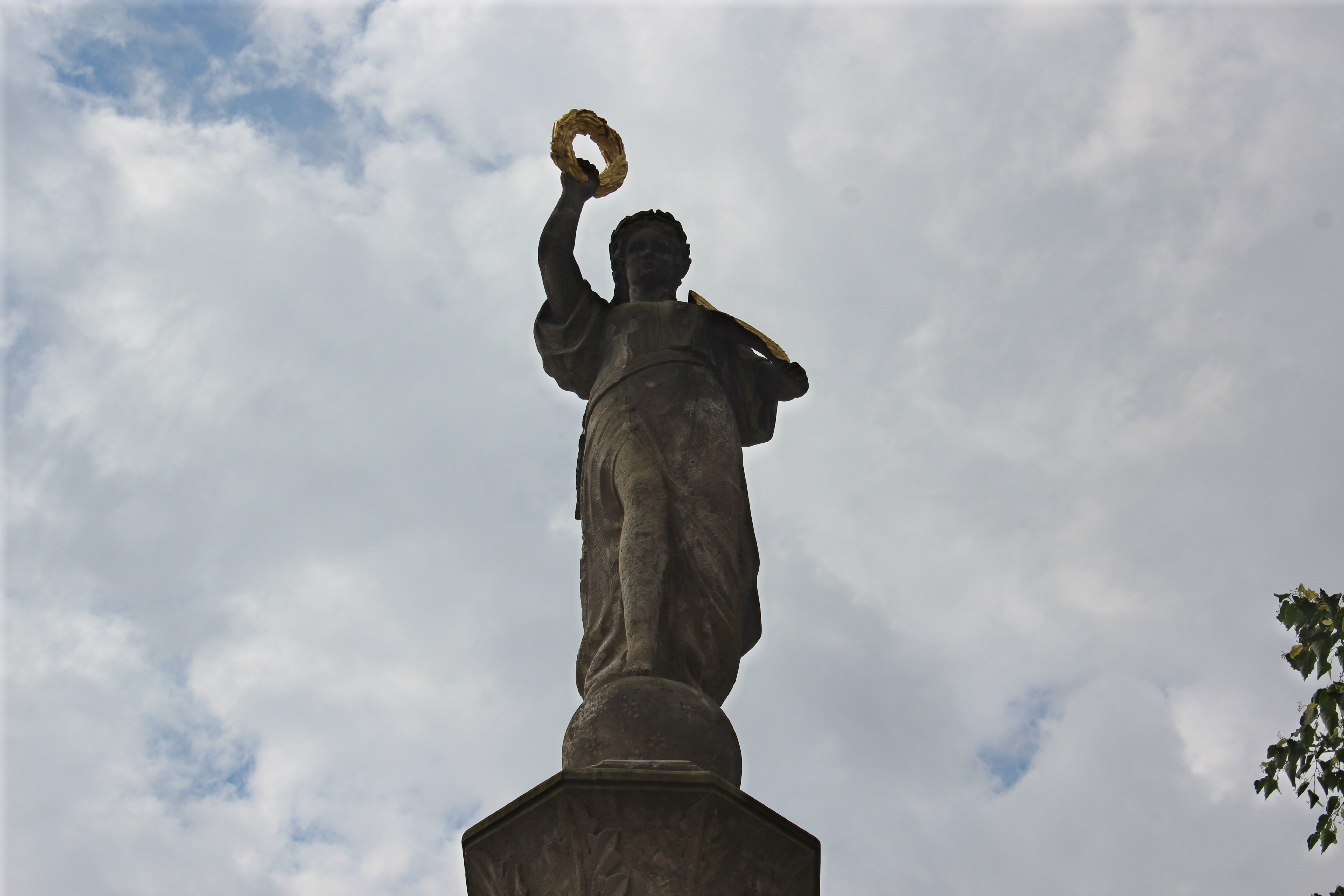 Kriegerdenkmal in Stolzenhain an der Röder